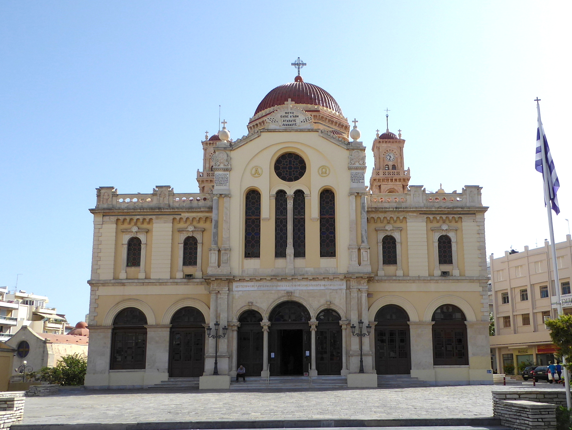 Blick auf die Westfassade